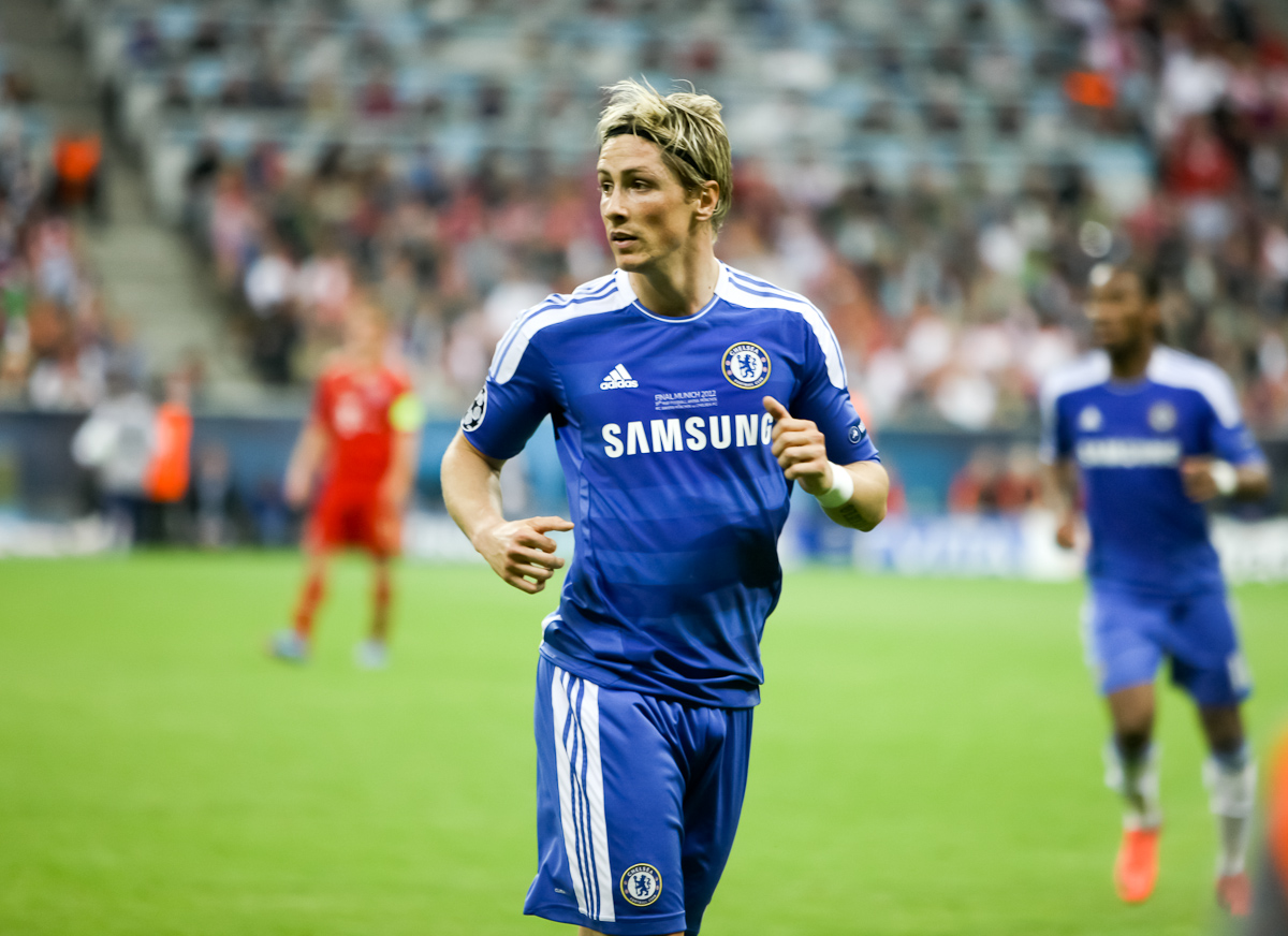 Fernando Torres disputando la final de la Liga de Campeones con el Chelsea el 19 de mayo de 2012.